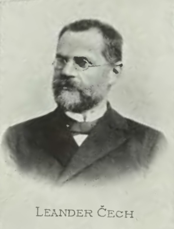 Portrét – Leander Čech (1854-1911), Český literární historik a národní buditel.